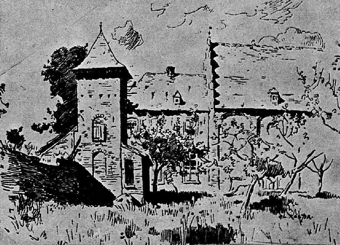 Ehemaliges Kloster Mariensande von Südwesten mit Taubenturm